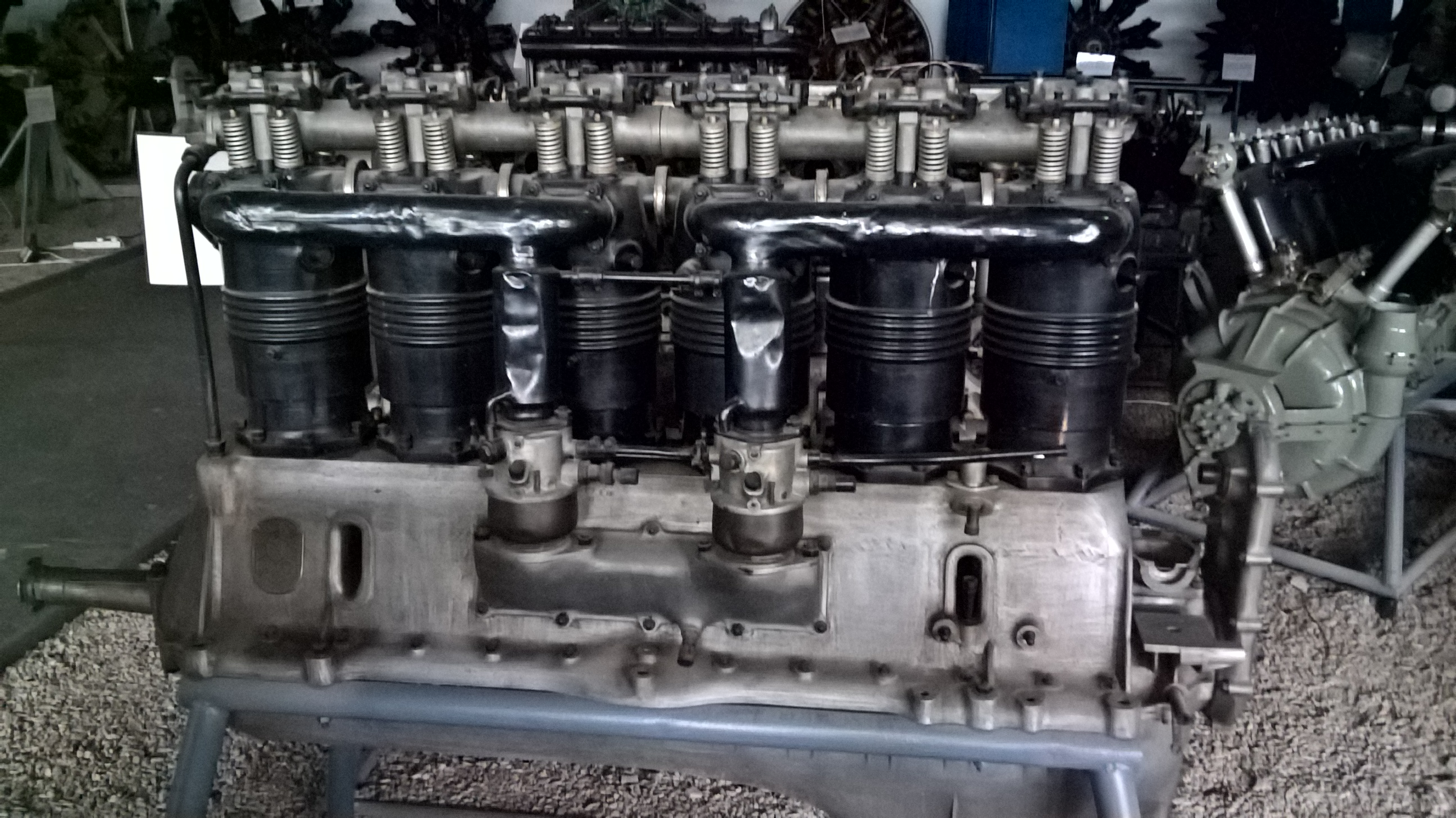 Niemiecki 6-cylindrowy silnik rzędowy NAG C.III z 1916 r., eksponowany w Muzeum Lotnictwa Polskiego w Krakowie.